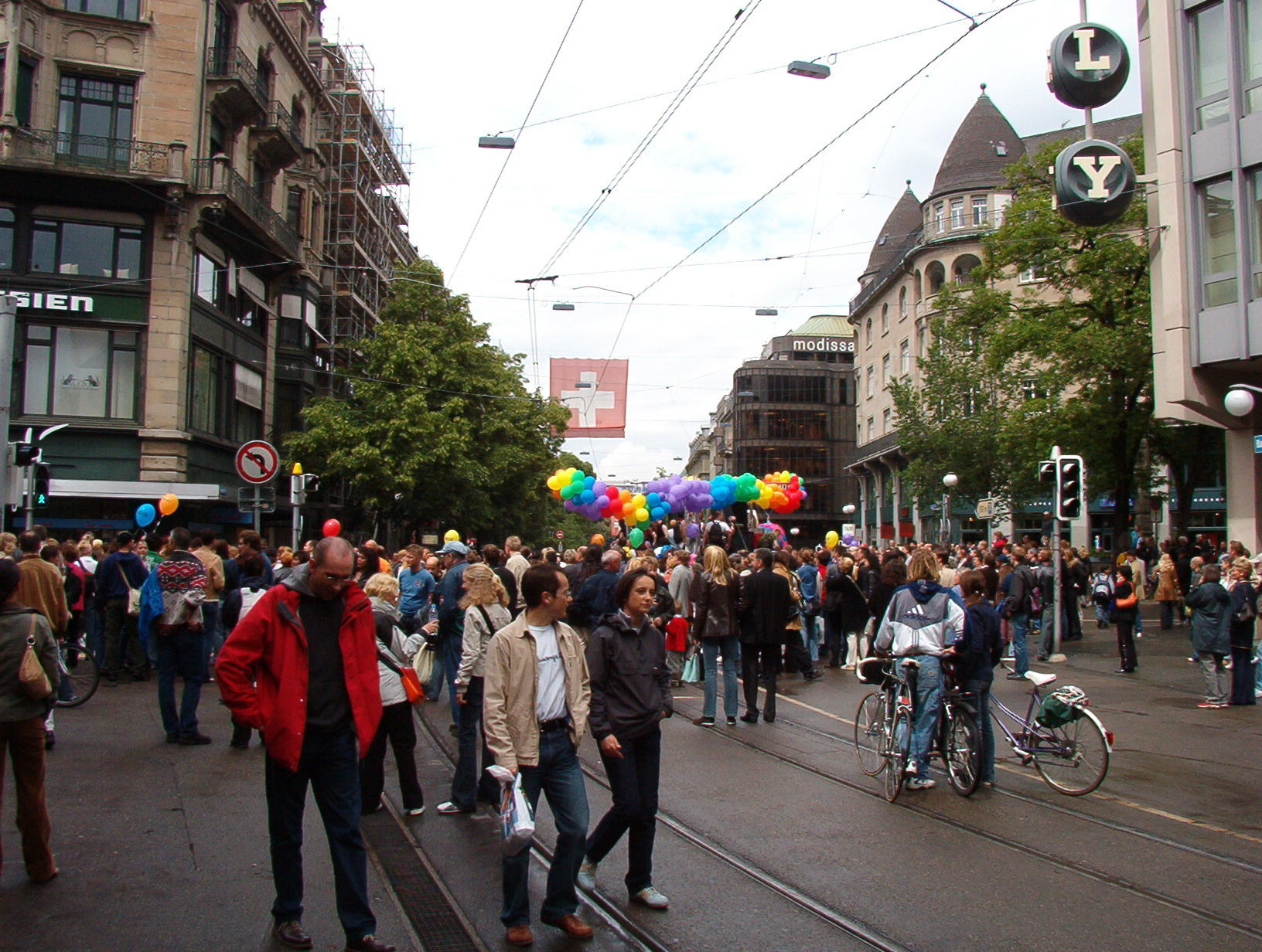 The Gay Pride Parade in Zürich, Switzerland.06-05-04 Zurich 0042